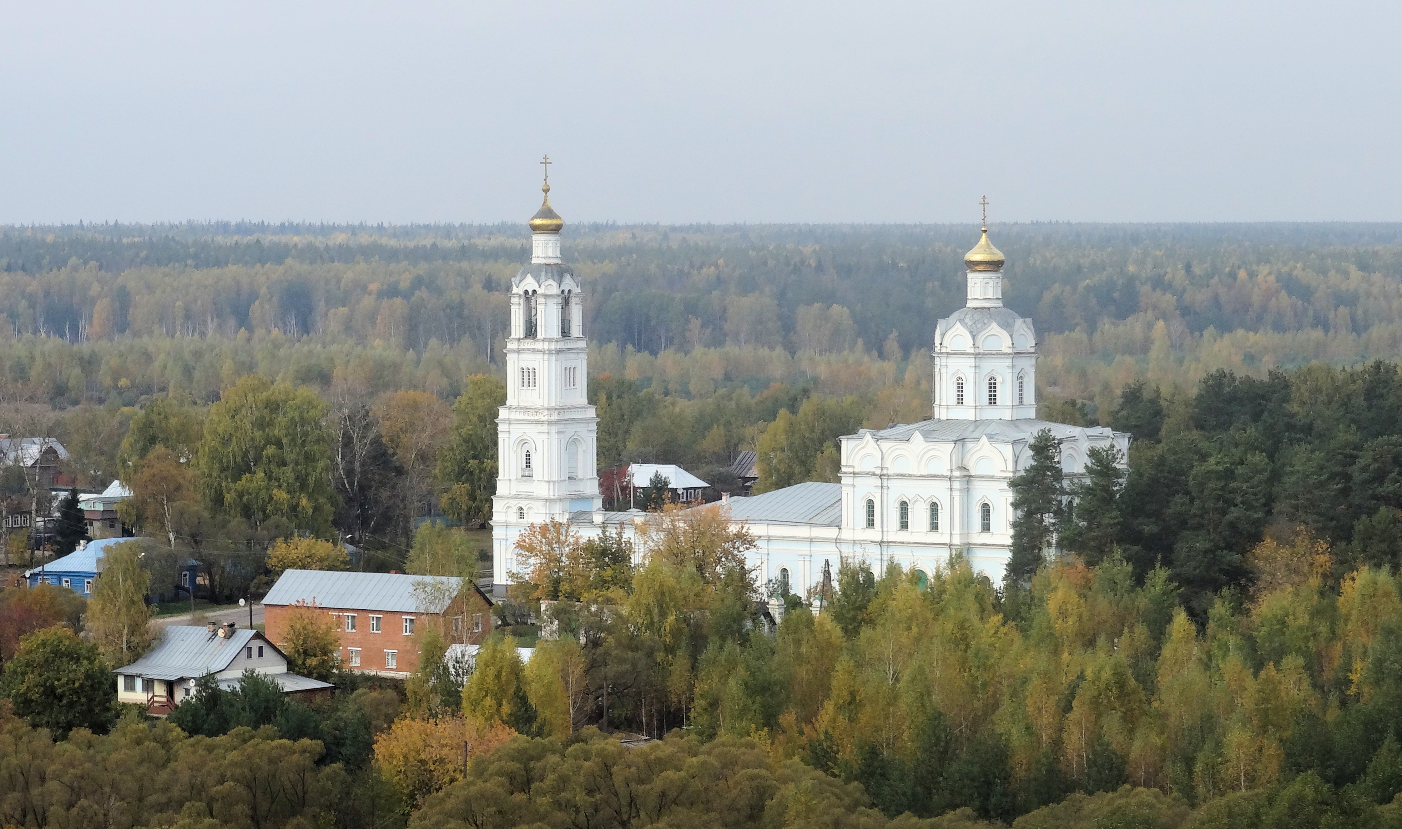 Ансамбль церкви Покрова Пресвятой Богородицы (Москва и Московская область, Рошаль, село Власово). Вид с высоты птичьего полета (~60м).